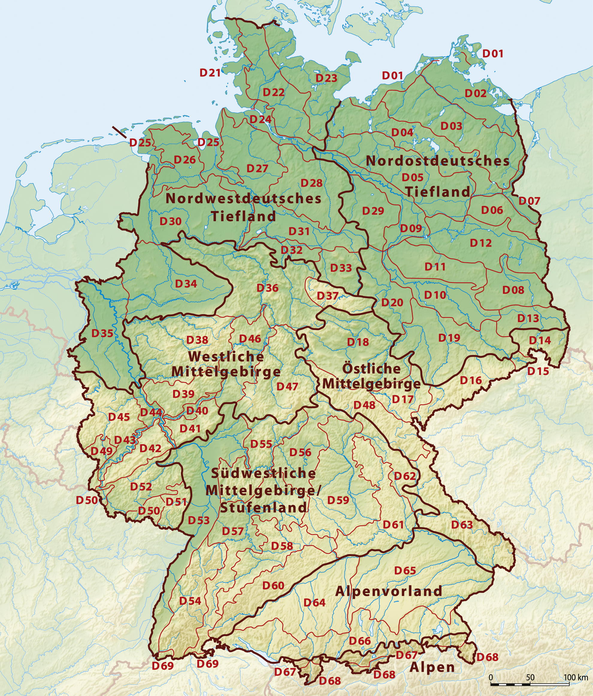 Karte der Naturräumlichen Großregionen Deutschlands nach dem System des Bundesamtes für Naturschutz (BfN), alter Stand